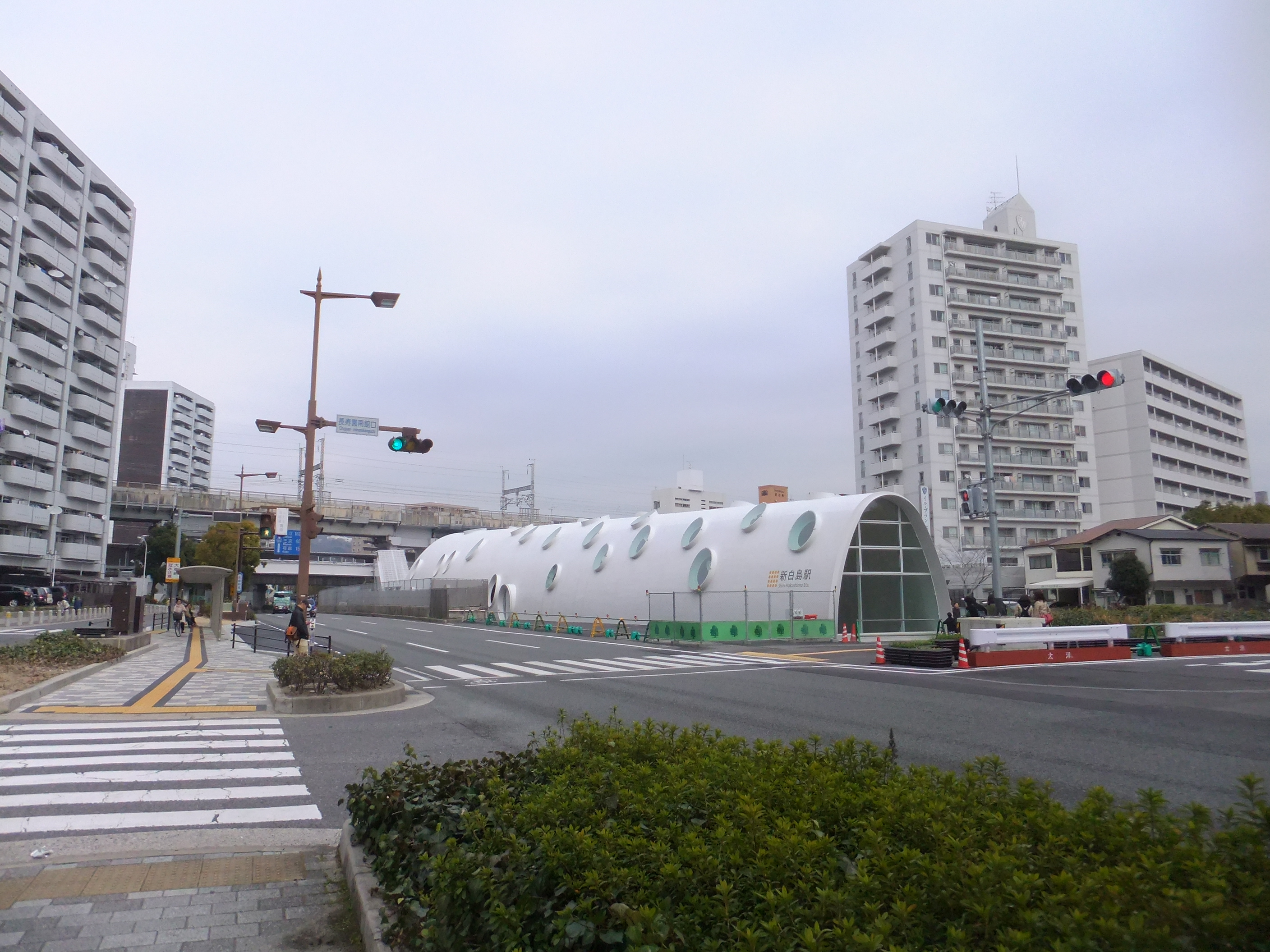 アストラム・新白島駅